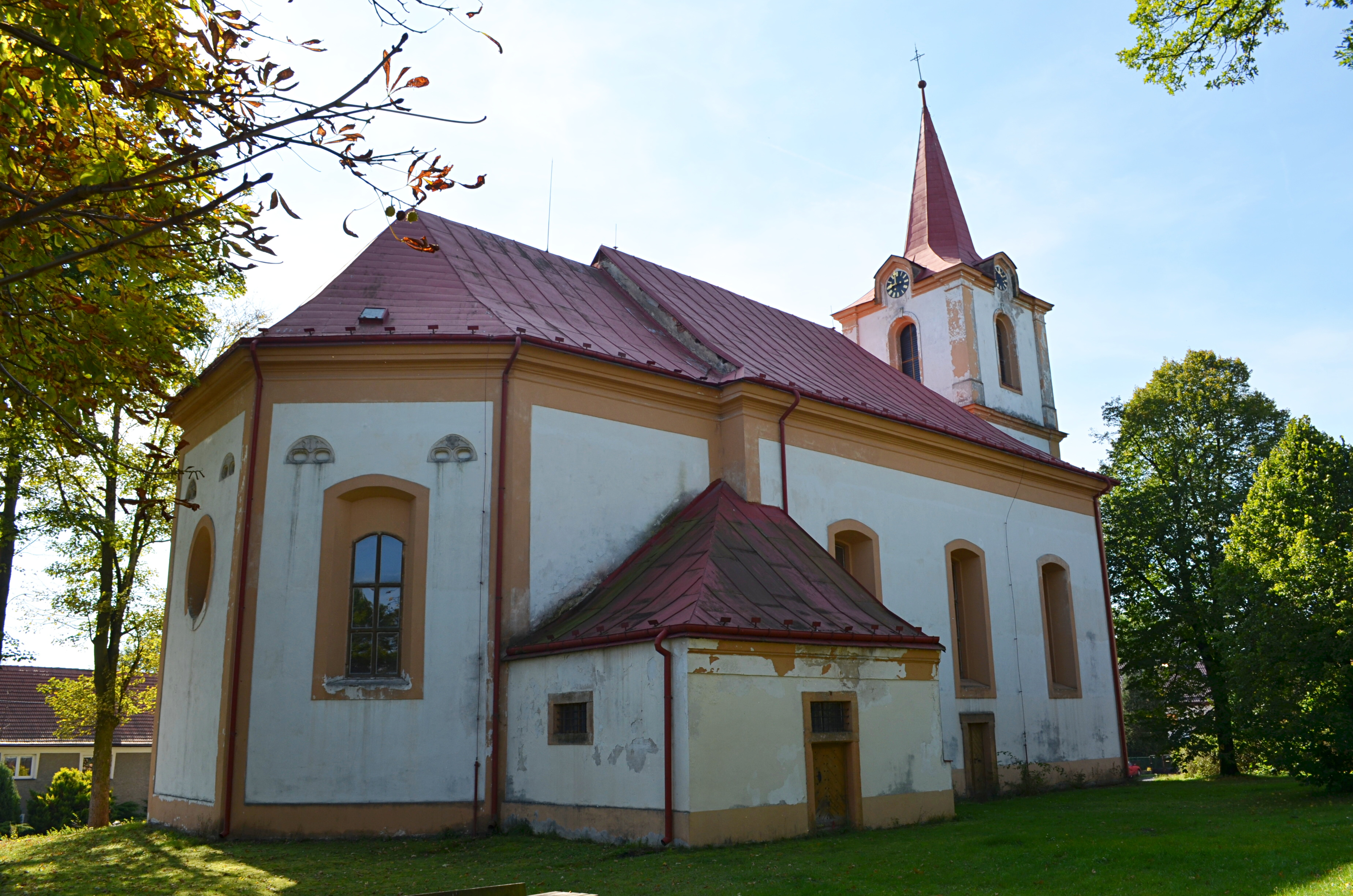 Kostel Nanebevzetí Panny Marie, Žalmanov.